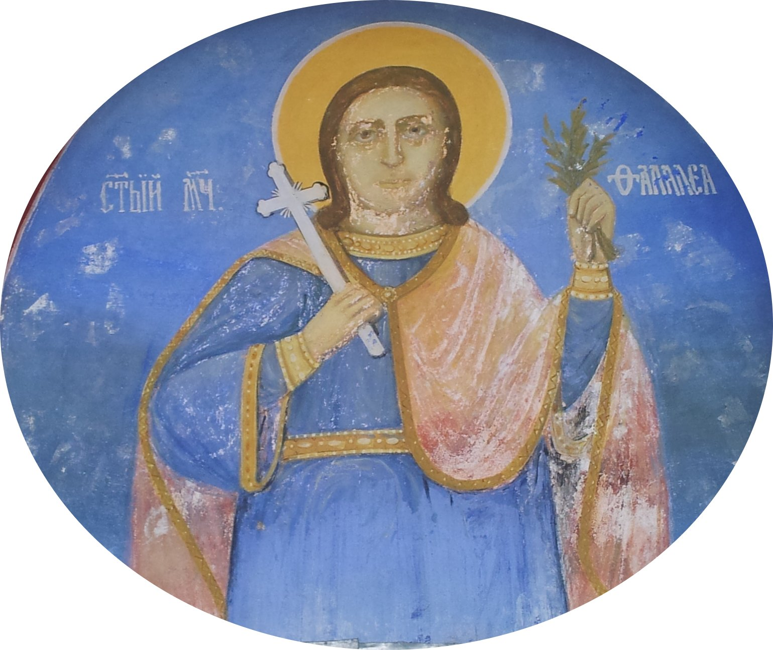 Икона на светецот Талалеј над влезот во црквата Св. Талалеј во с. Брест, Македонија